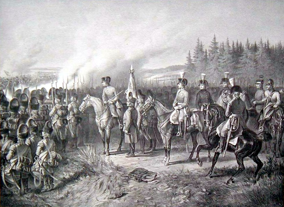 Erzherzog Karl in der Schlacht bei Stockach